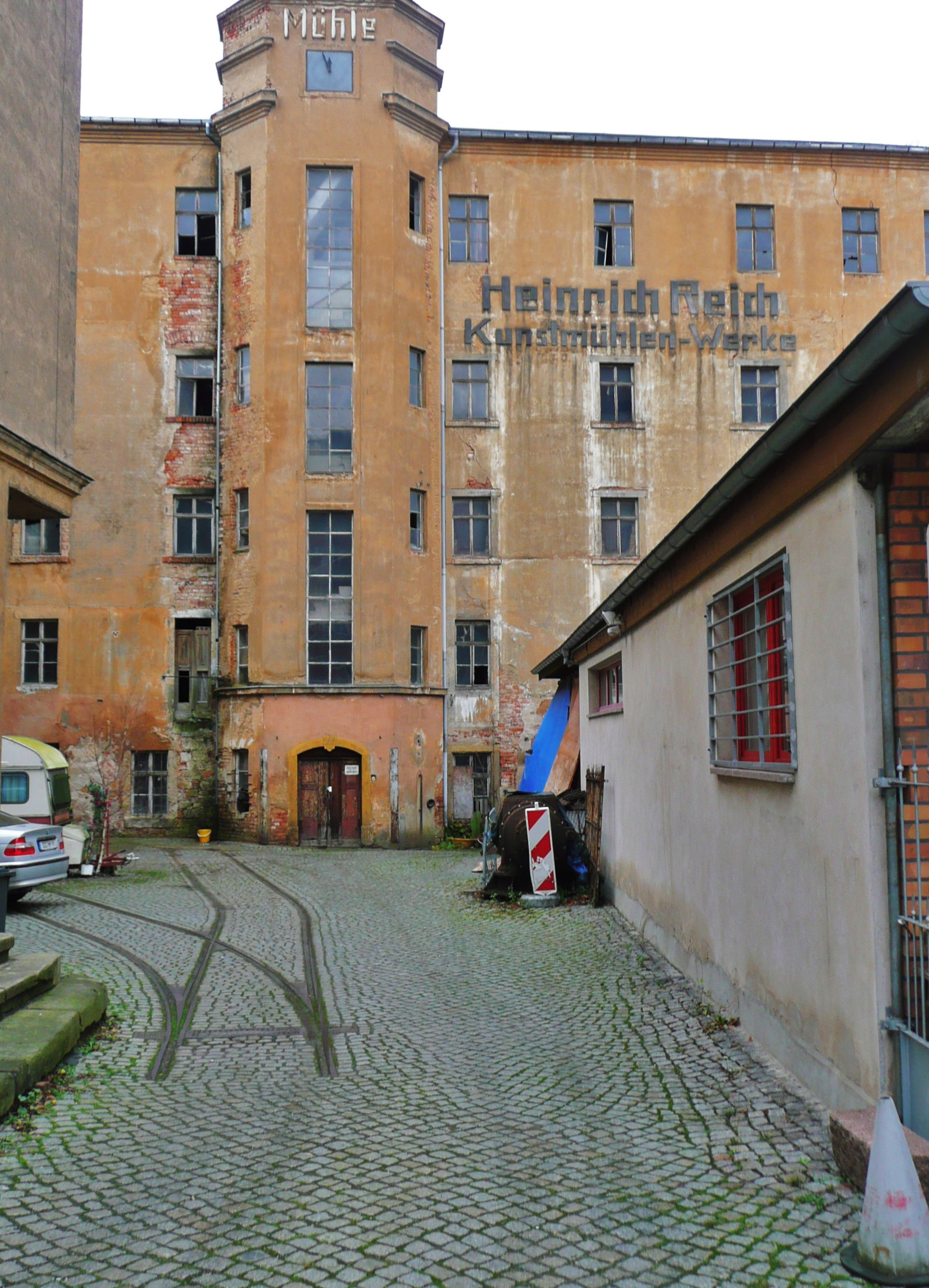 erhaltene Straßenbahnschienen in der ehemaligen Kunstmühlenfabrik Heinrich Reich Meißen, Talstraße 87